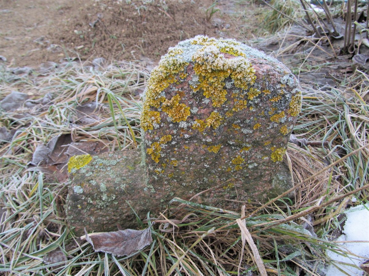 Вынісцы. Могілкі